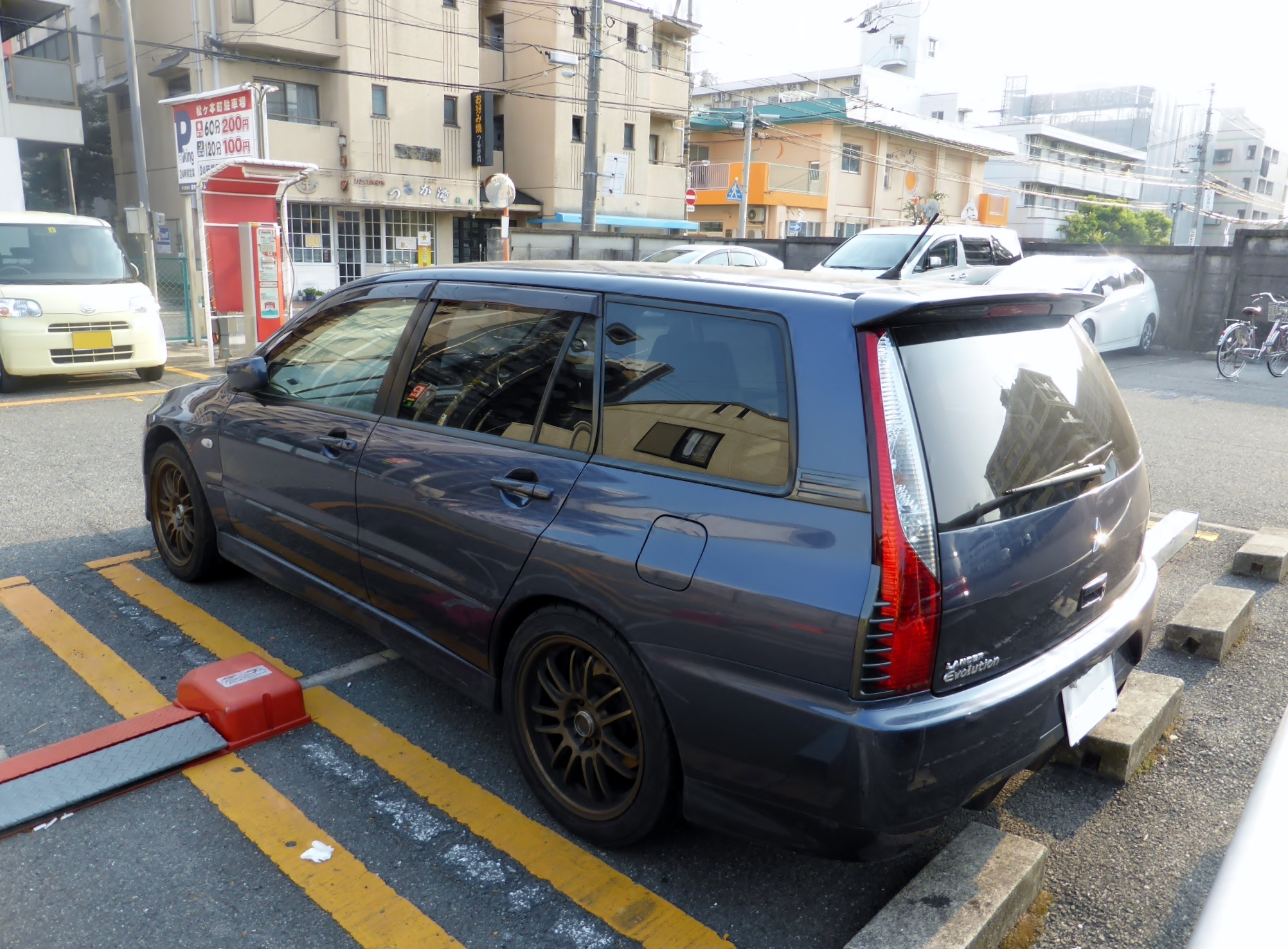 三菱・ランサーエボリューションワゴンGTをリアから撮影。